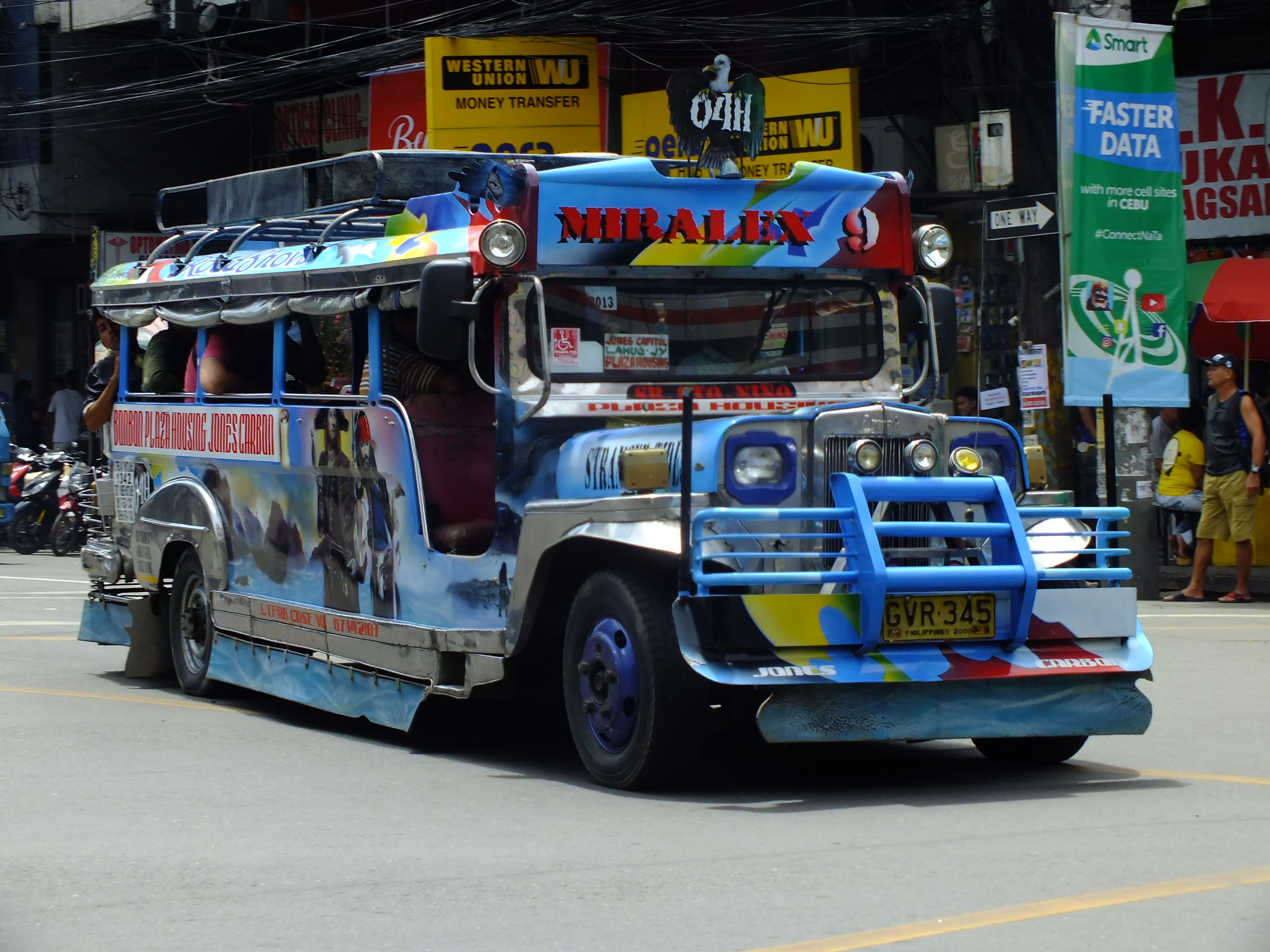 2016-09-27Jeepney in Cebu City